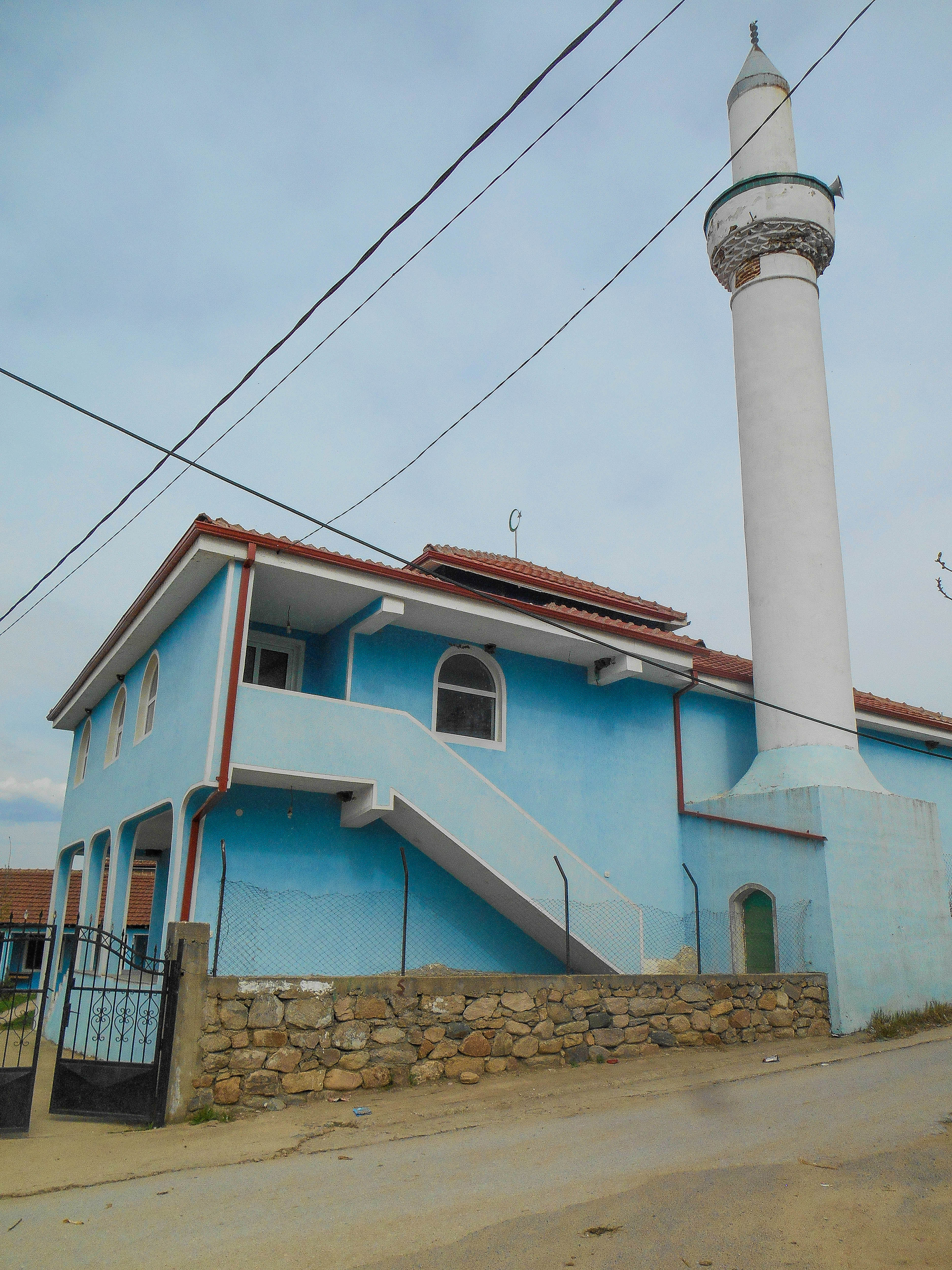 Новата џамија во селото